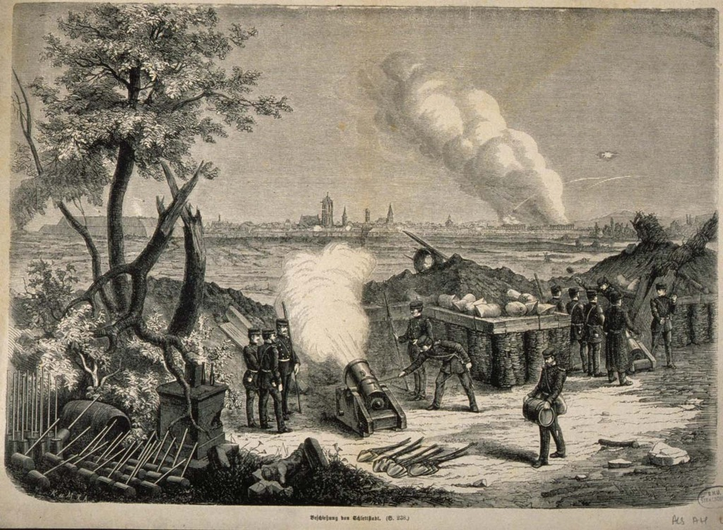 Illustration de l'attaque allemande sur Sélestat en 1870, lors de la guerre franco-allemande. Edité en 1870.